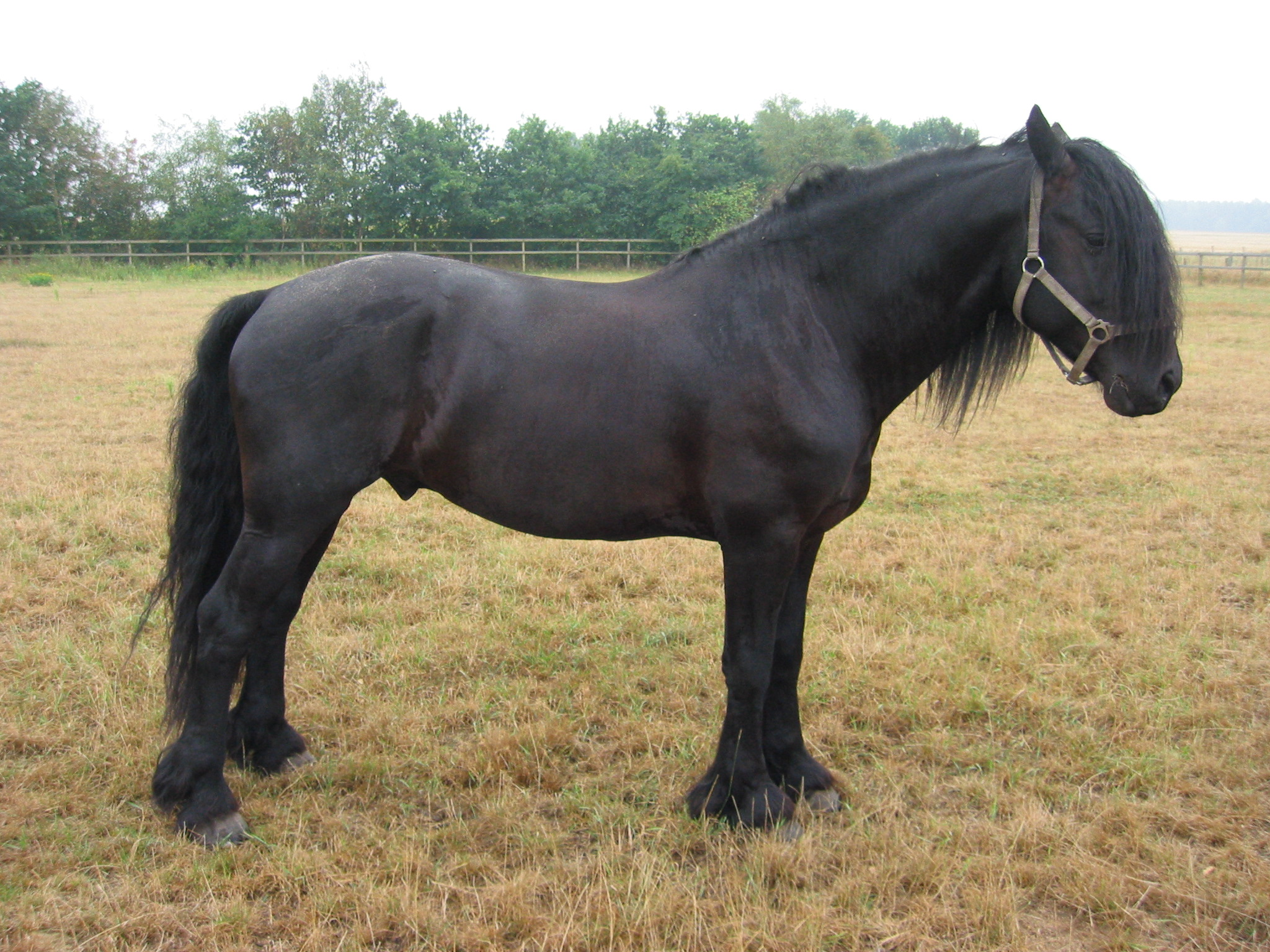 Friese mit ausgeprägtem Behang